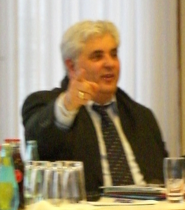 Il Presidente di ACLI Germania Carmine Macaluso